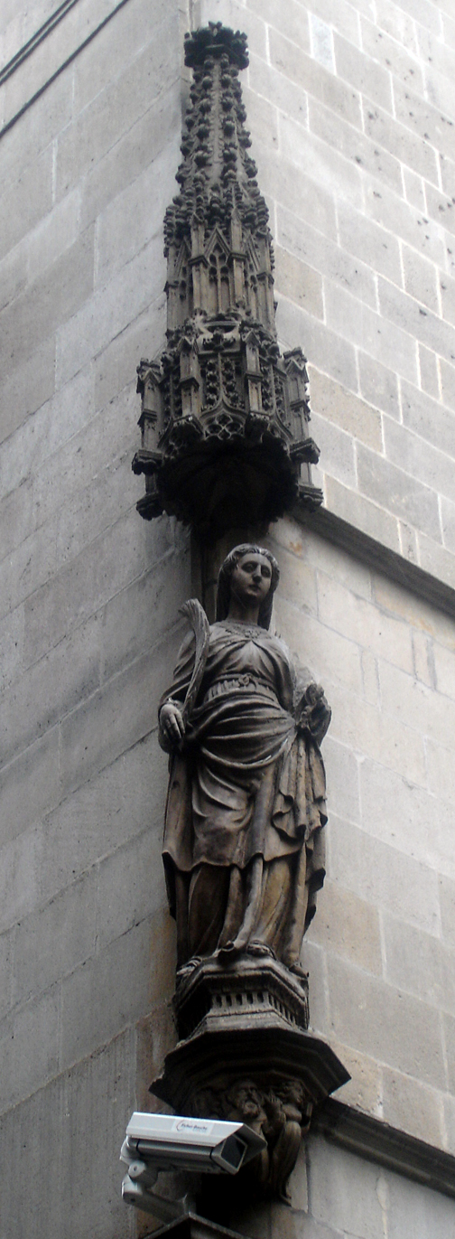 Façana antiga de l'ajuntament de Barcelona (Catalunya, Espanya) - Santa Eulàlia